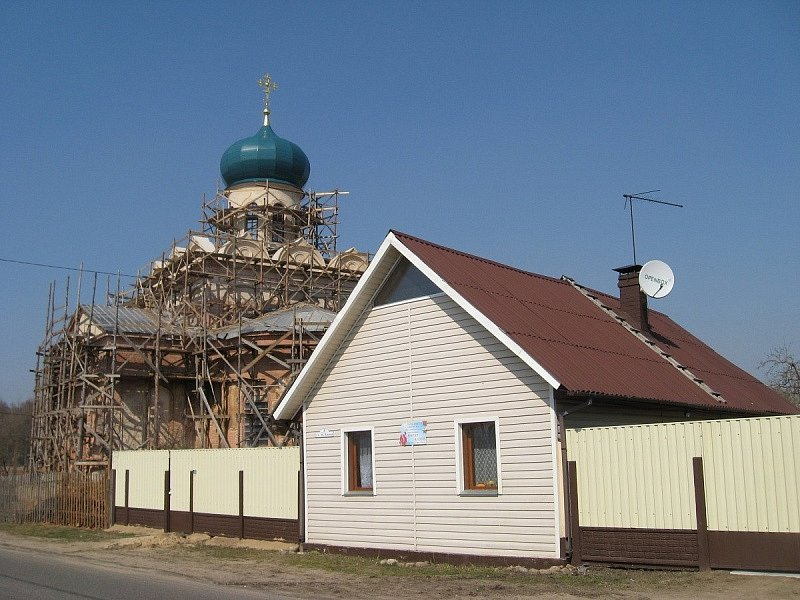 Станькава. Аднаўленне царквы